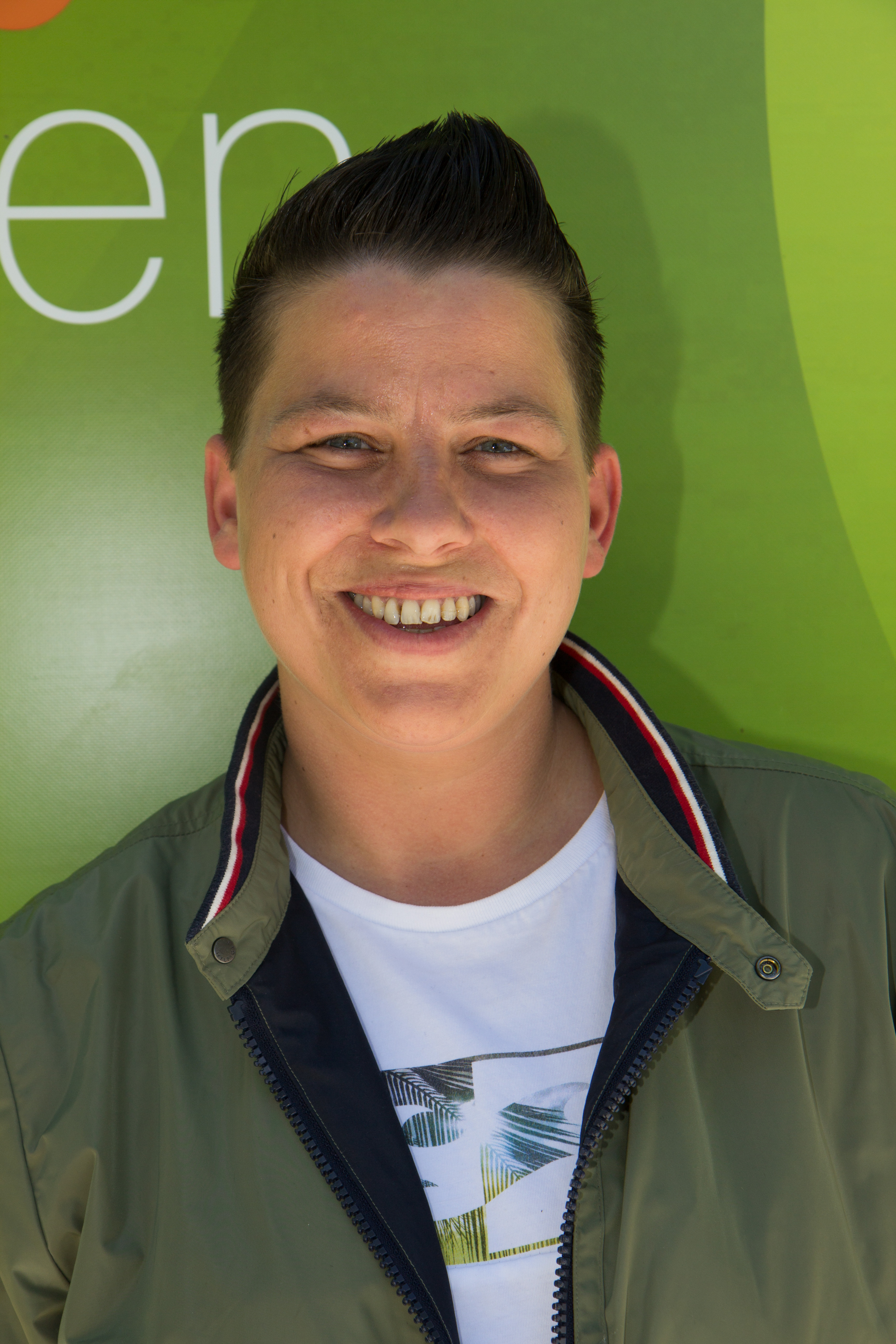 Kerstin Ott als Gast beim ZDF-Fernsehgarten am 1. Juli 2018 in Mainz.